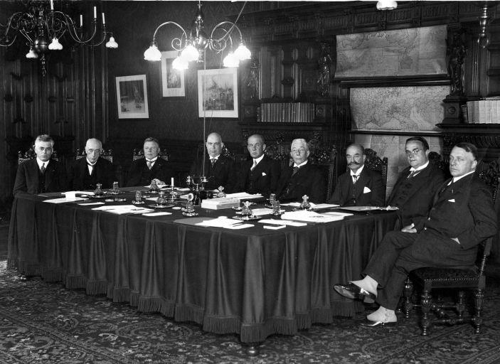 Tweede kabinet (ministerie) Colijn, 1933-1935. Eerste zitting van de ministerraad. V.l.n.r.: Oud, Marchant, De Wilde, Van Schaik, De Graeff, Colijn, Kalff, Verschuur, Deckers. 1933.